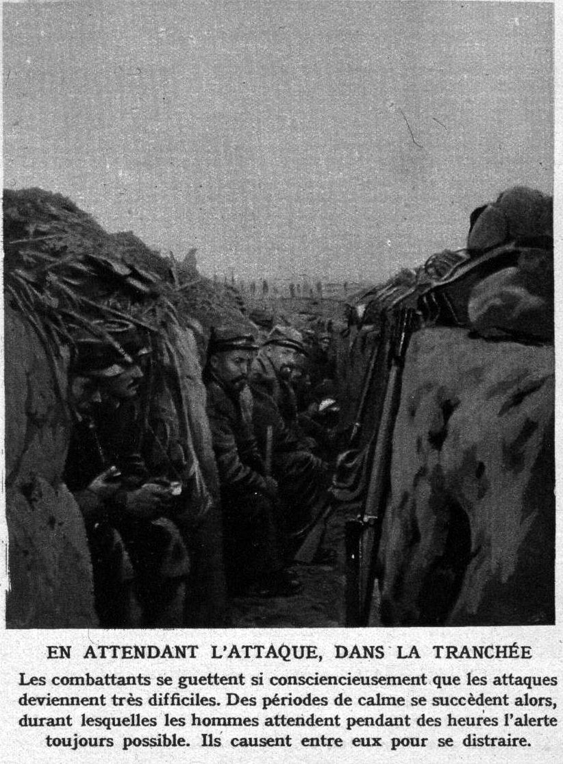 Le magasine Le Miroir publie cette photographie d'une tranchée de première ligne en 1914.